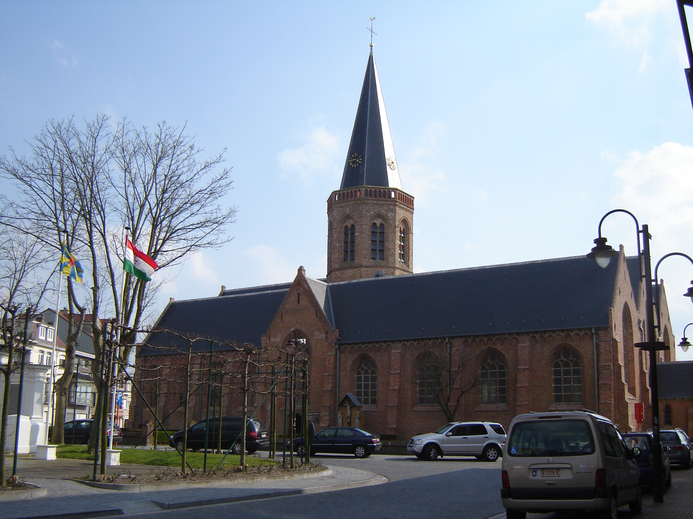 Kerk van de Heilige Kruisverheffing in WenduineChurch of the Exaltation of the Cross in Wenduine, De Haan, West Flanders, Belgium